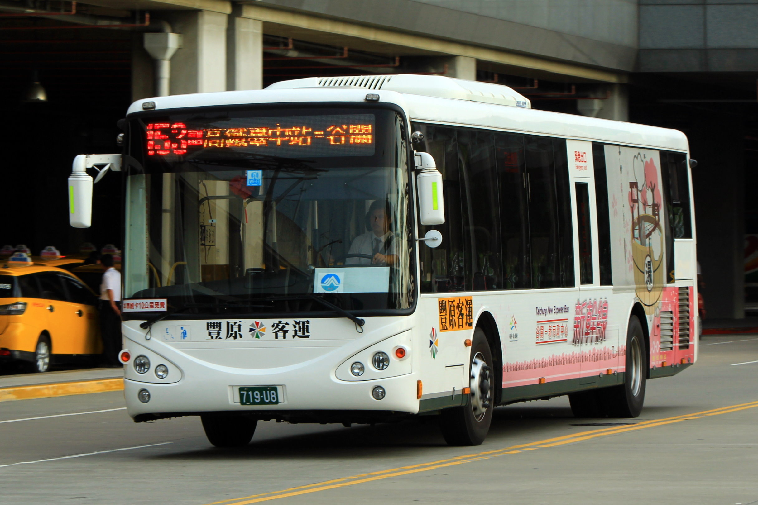 153副 高鐵台中站